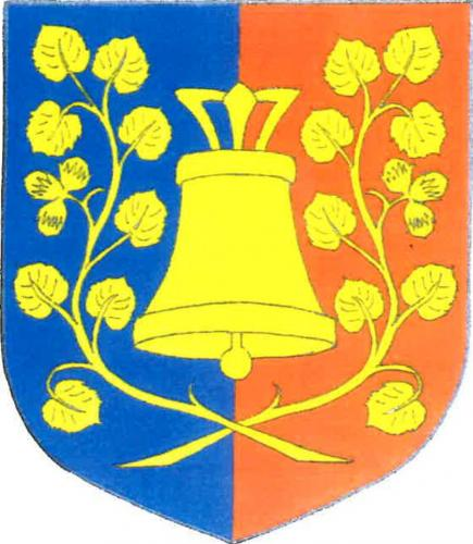 Chlístov, okres Rychnov nad Kněžnou, znak